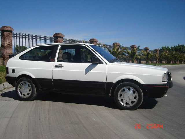 Fotografía de un VW Gol Mk I.